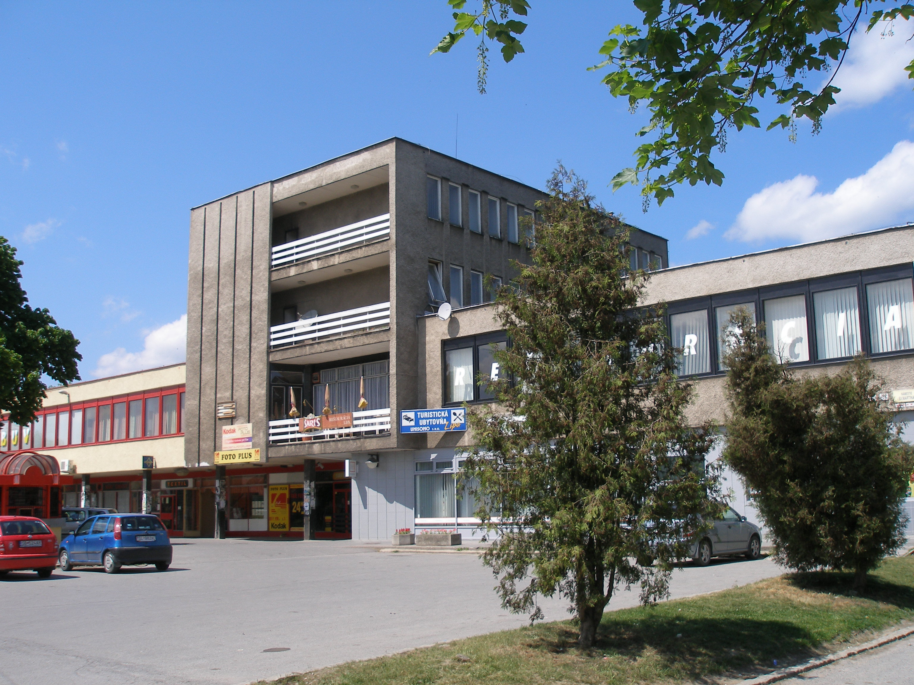 Mesto Lipany v okrese Sabinov.